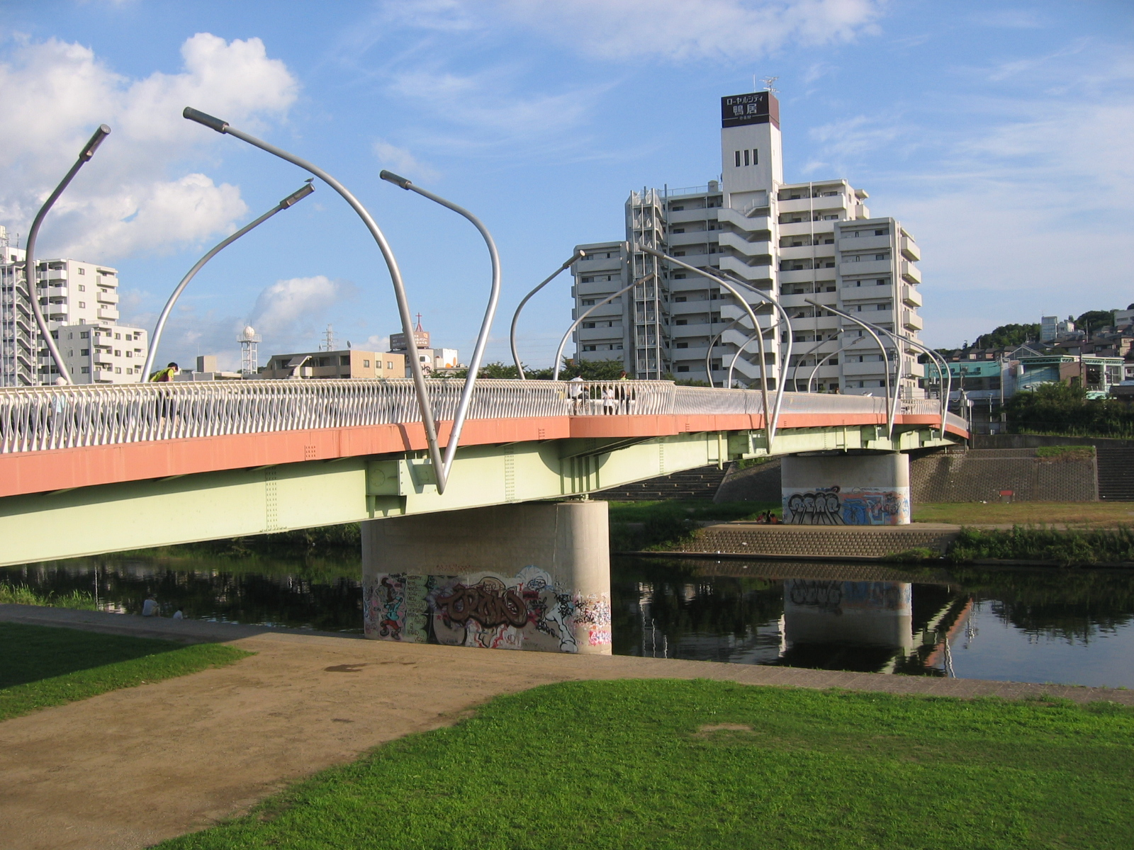 2006年8月21日、利用者自身の撮影。